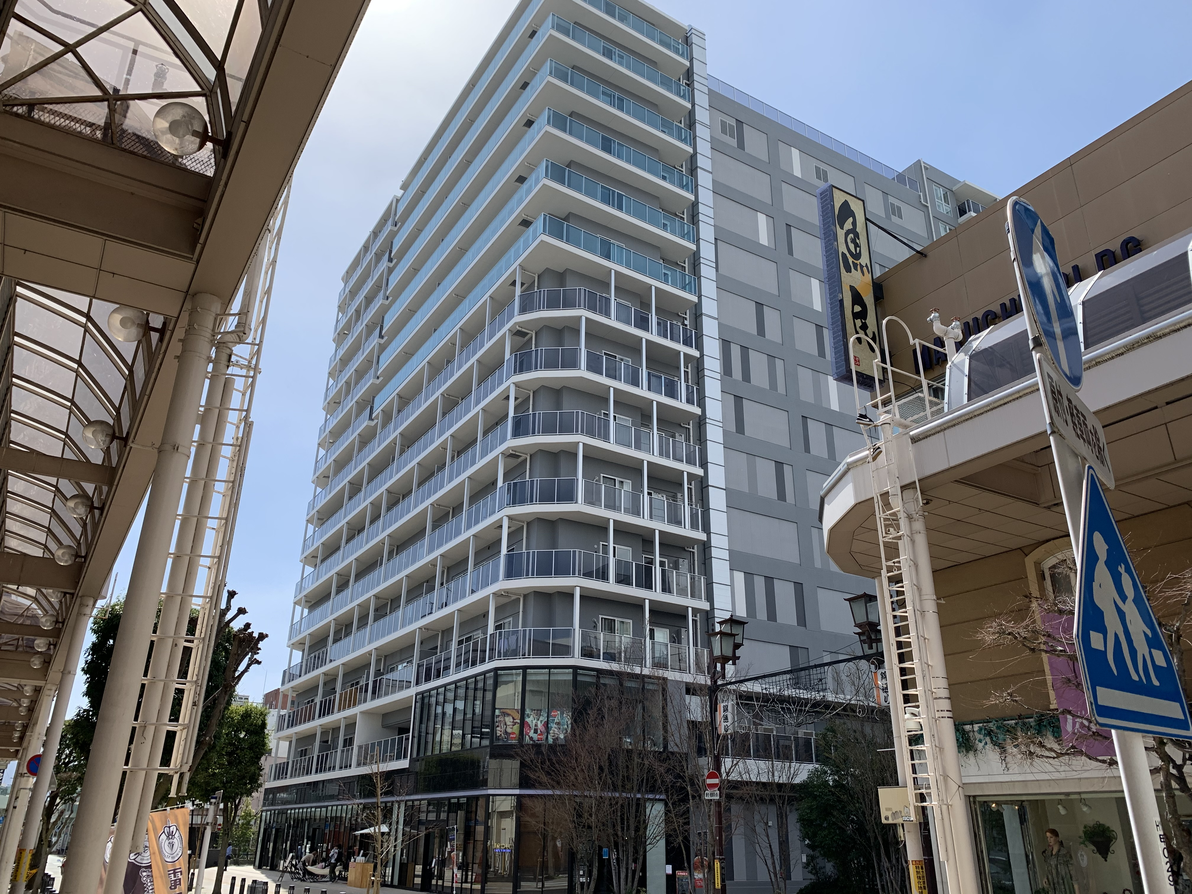 甲府銀座ビル跡地に建設されたデュオヒルズ甲府。1階が店舗、2階以上がマンションとなっている。